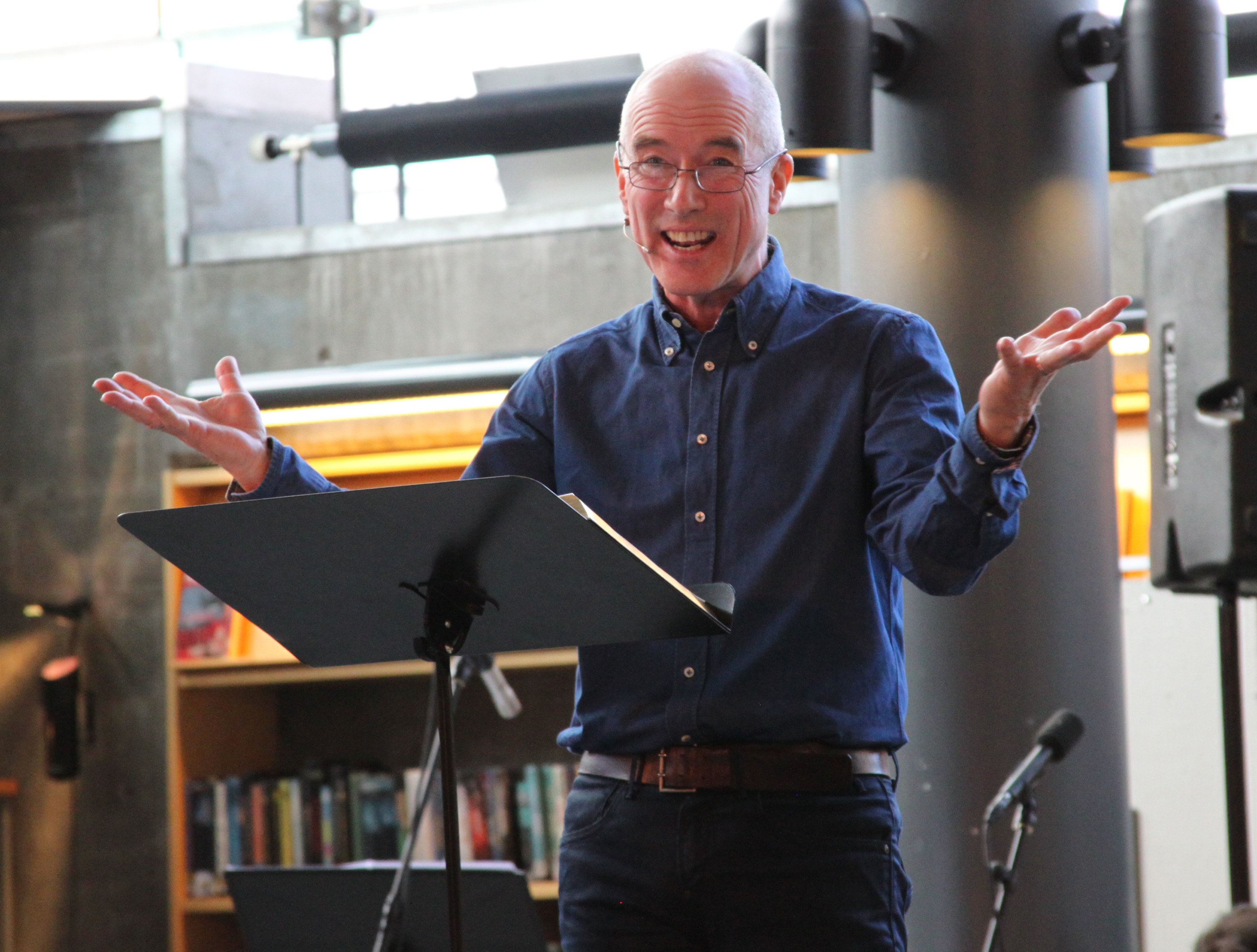 Hans Olav Mørk under kirkemøtet i 2012